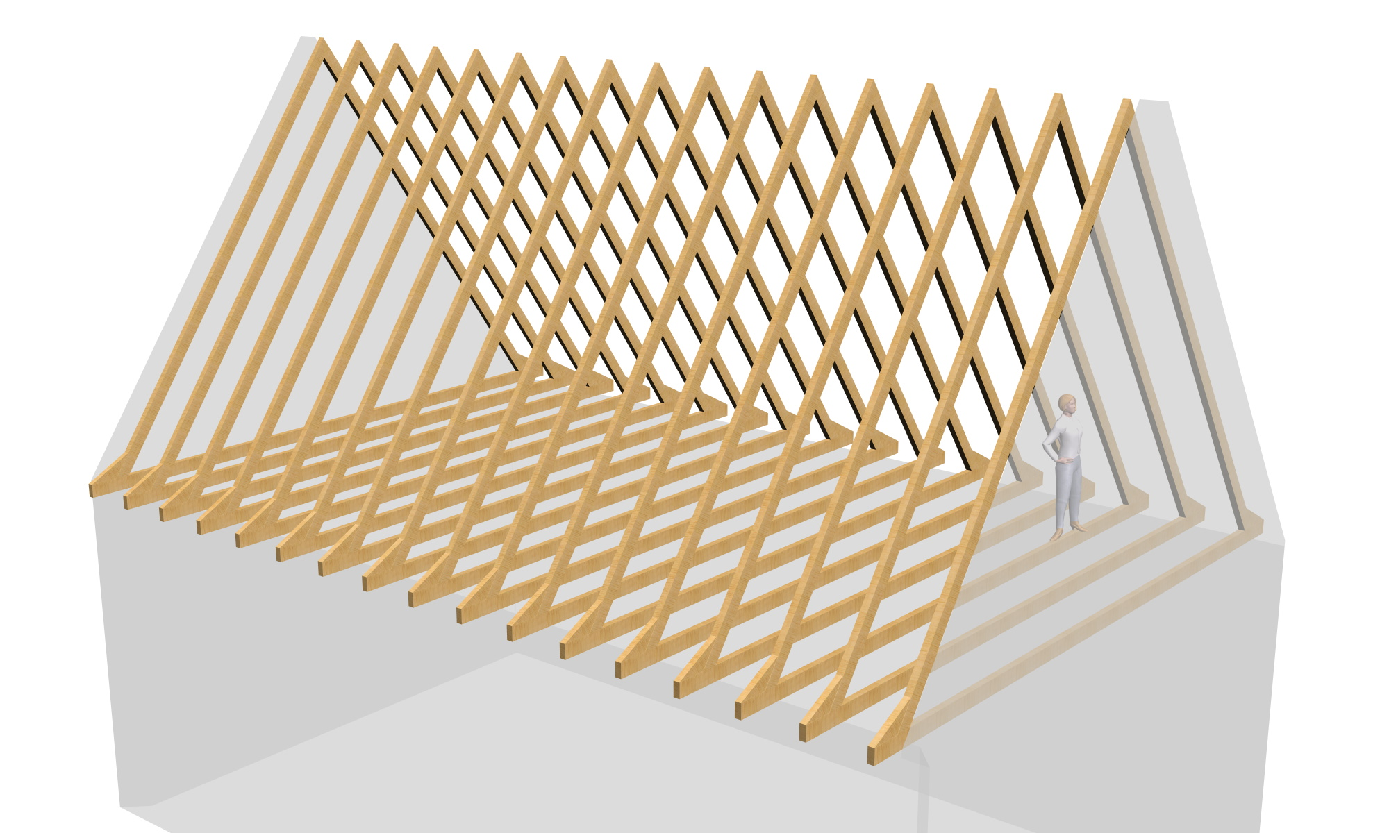 Sparrendach_mit_Balkenlage